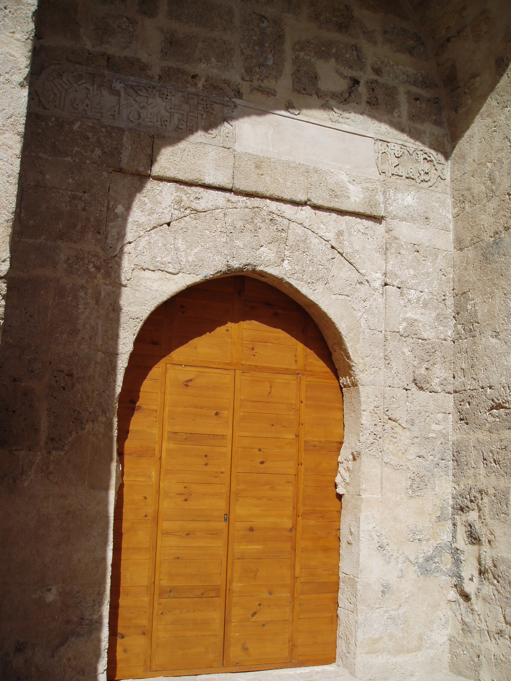 Puerta de la Alcazaba de Loja, Granada. Antesala de la capital del reino nazarí de Granada, el mismísimo Boabdil entregó la ciudad al rey Fernando el Catolico en 1486,tras un penoso asedio de varios días.